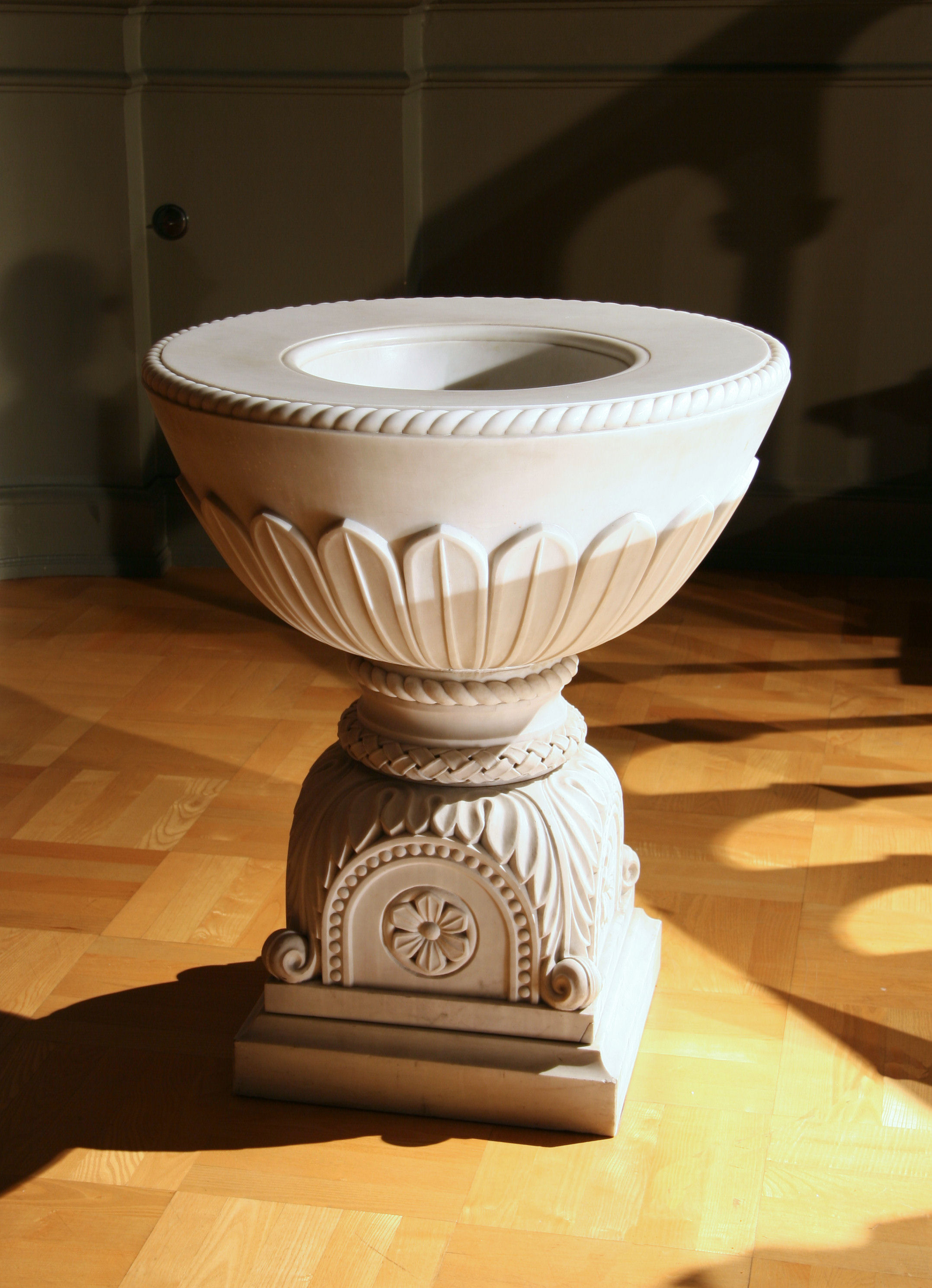 Sankt Pauls Kirke, Copenhagen, Denmark. Baptismal font